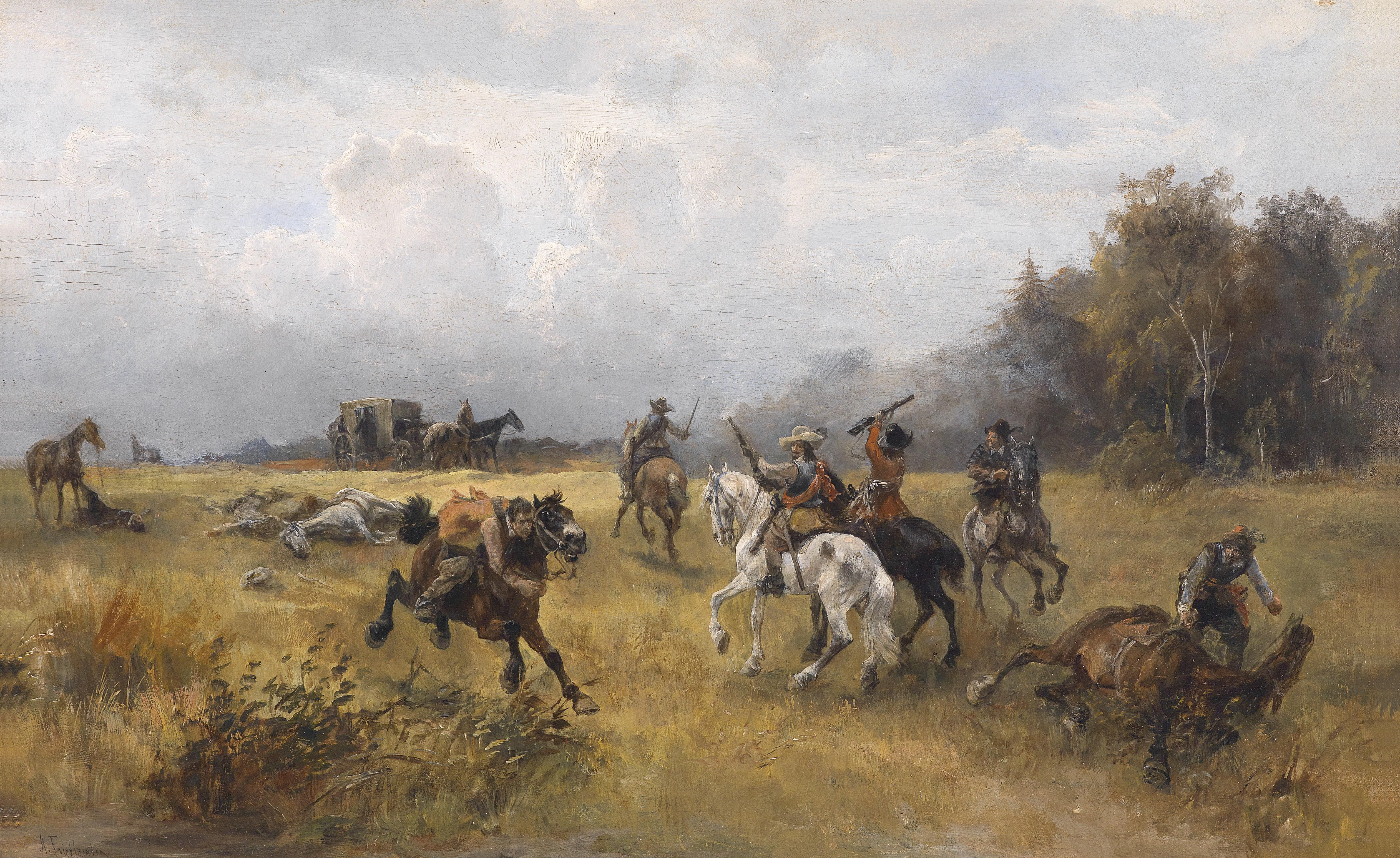 Nach dem Überfalle